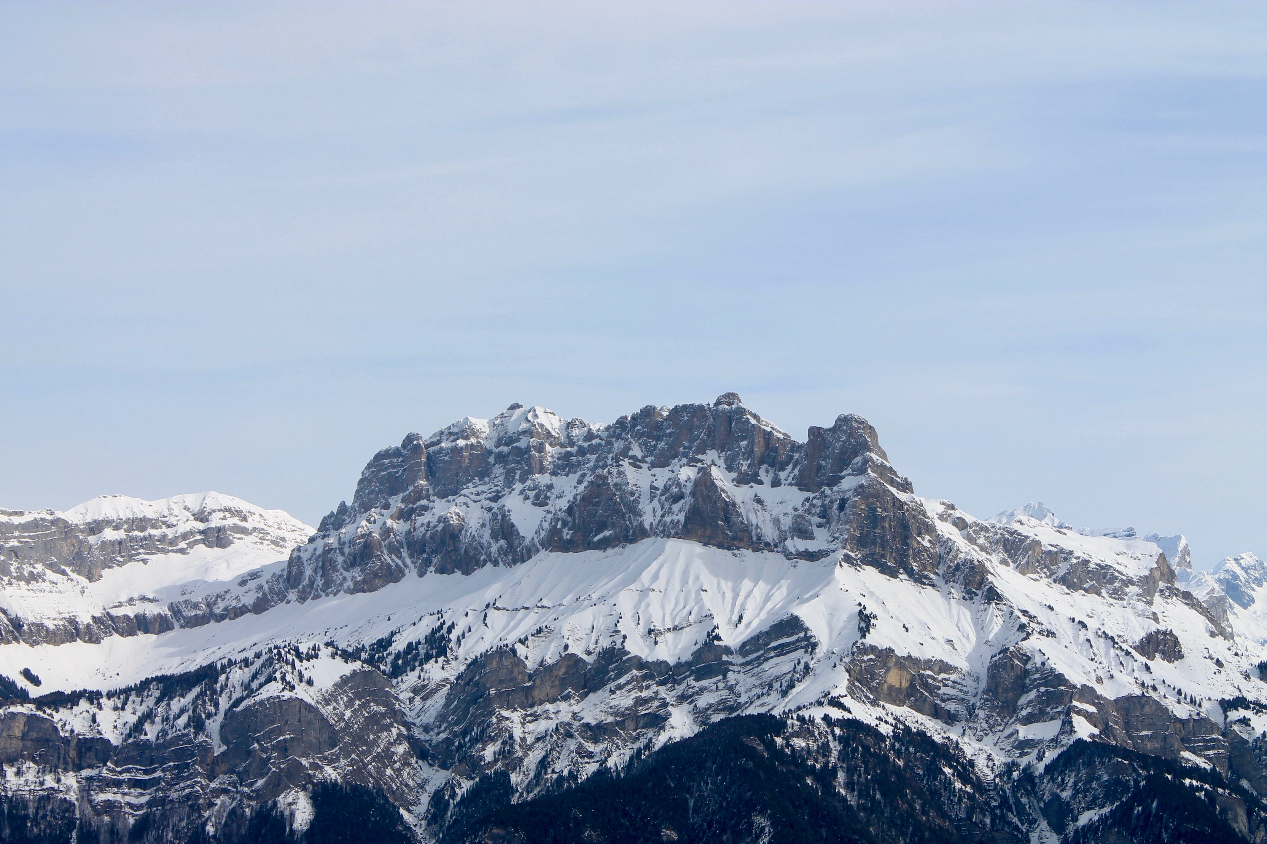 Tête du Colonney et Varan, versant ouest, depuis Tête Noire (2017)